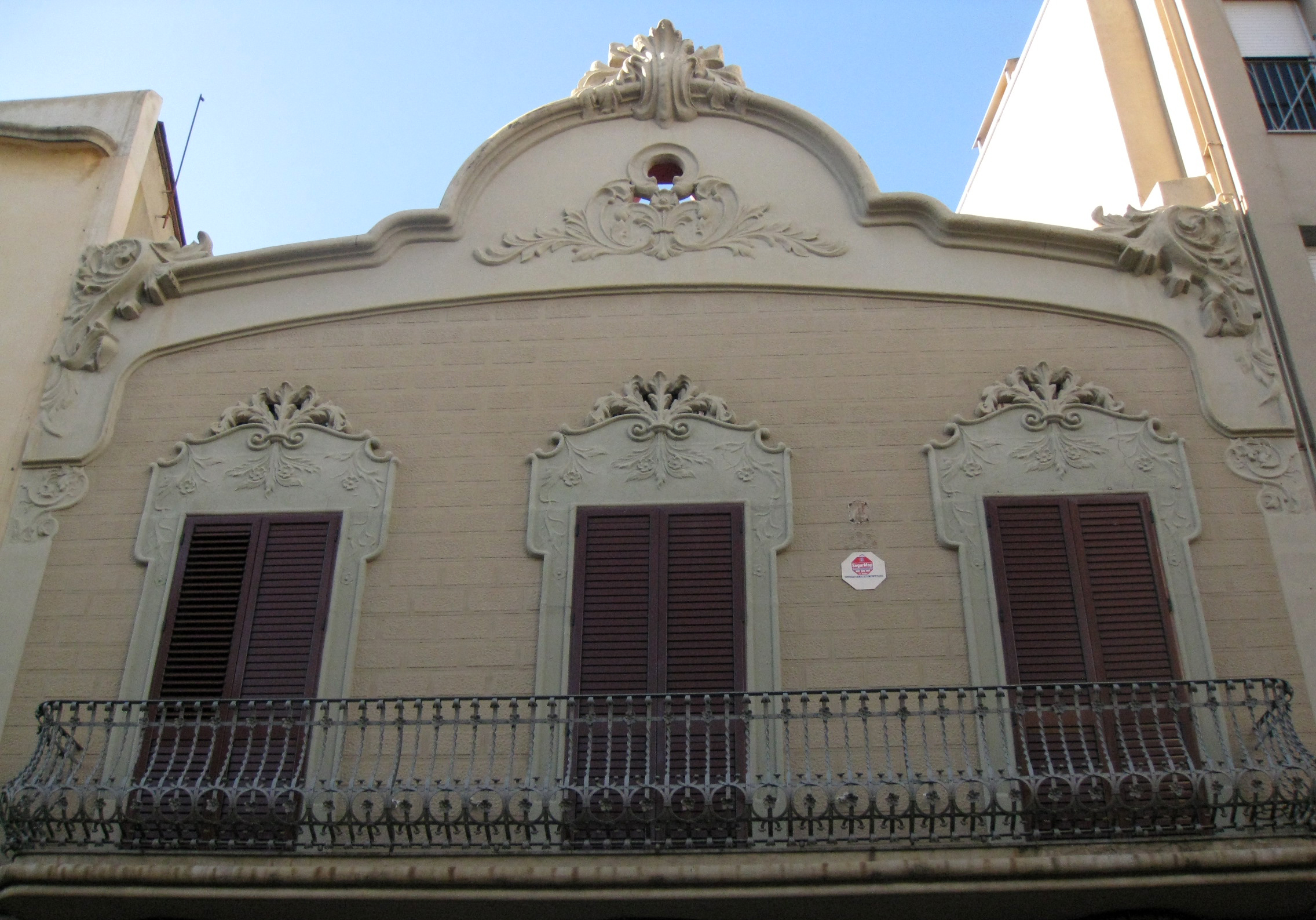 Casa Pere Romaní, al carrer del Nord núm. 81 (Terrassa). Edifici modernista de Domènec Boada i Piera (1908). Vista de la part alta.